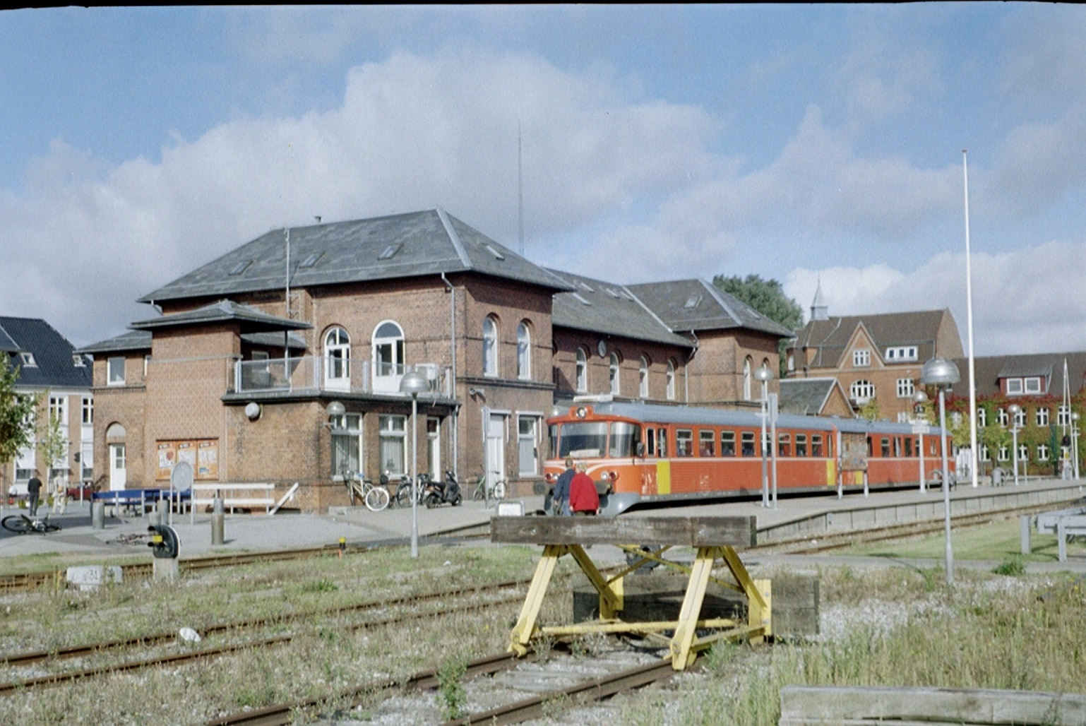 Odder banegård, Odder, Danmark